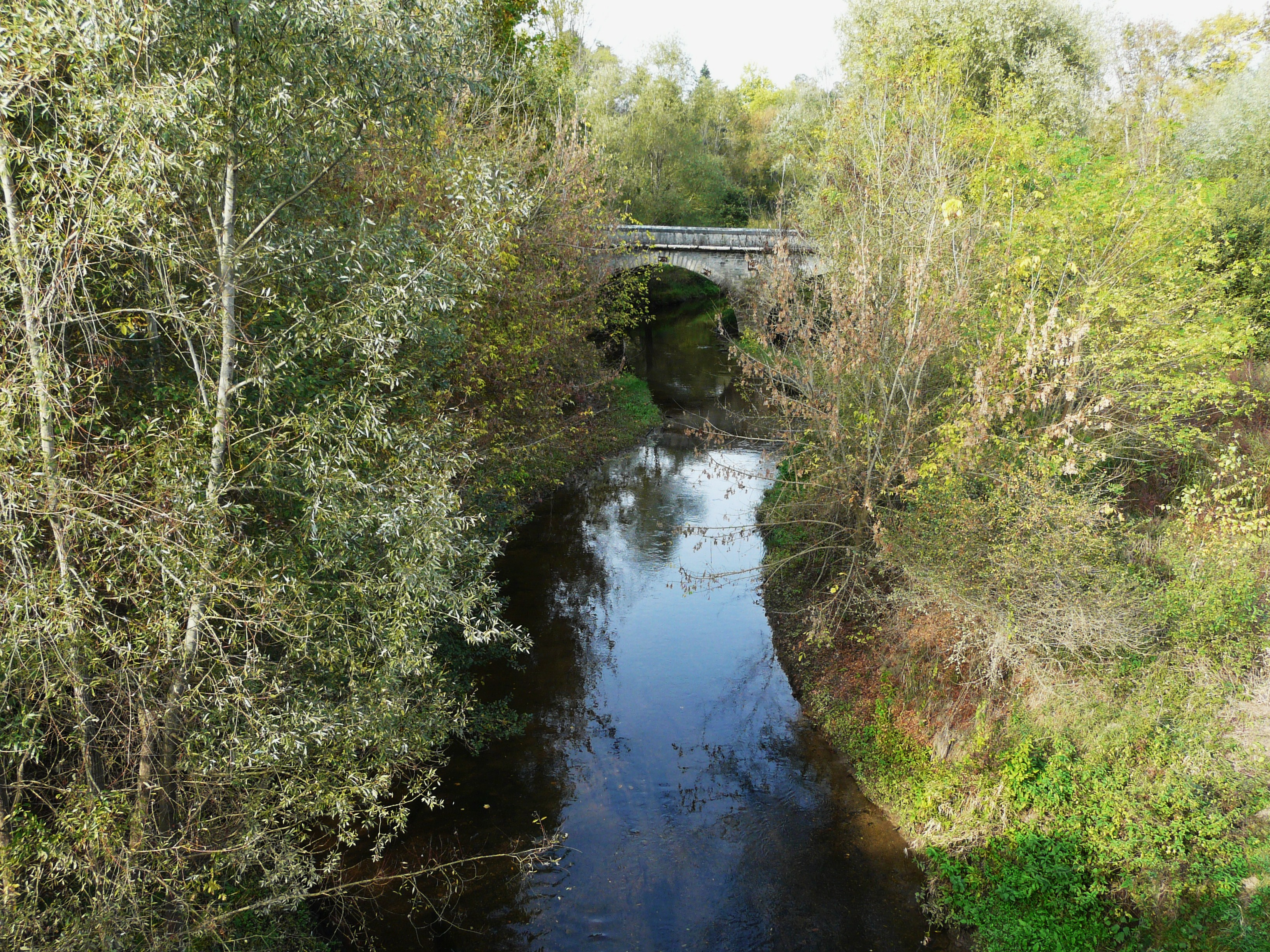 Le Lary à 800 mètres de sa confluence avec l'Isle, Guîtres, Gironde, France